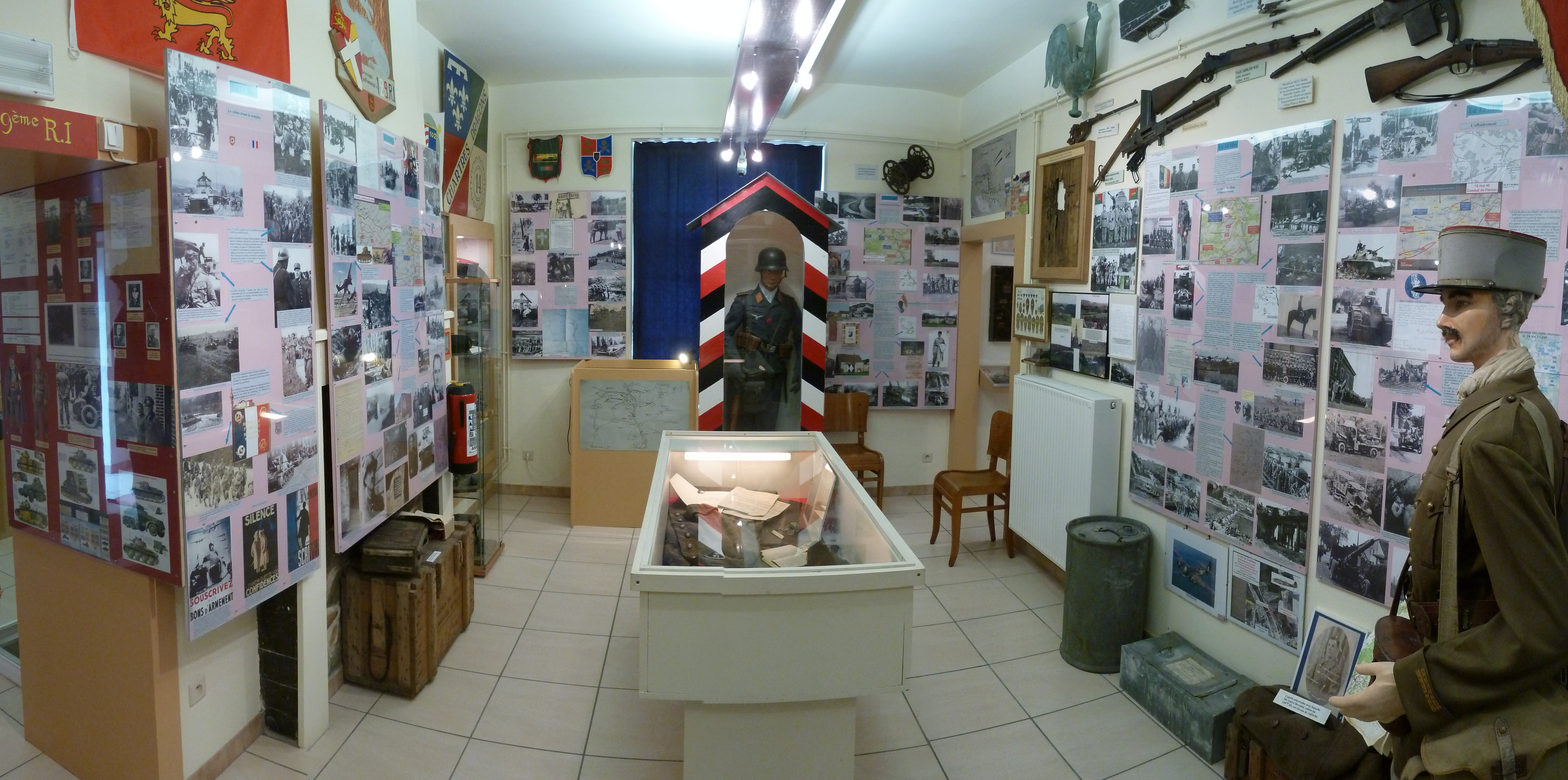 Salle principale